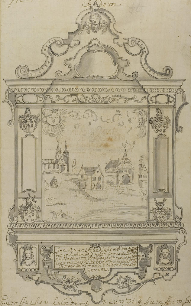 Sebastianskapelle in Ladenburg. Epitaph für Wolfgang III. Hartmut von Cronberg, Hans Schweikard III. von Cronberg und Julius von Cronberg. Wappen der Ahnen: von Cronberg, Kämmerer von Worms genannt von Dalberg, von Sickingen, Mühl von Ulmen.